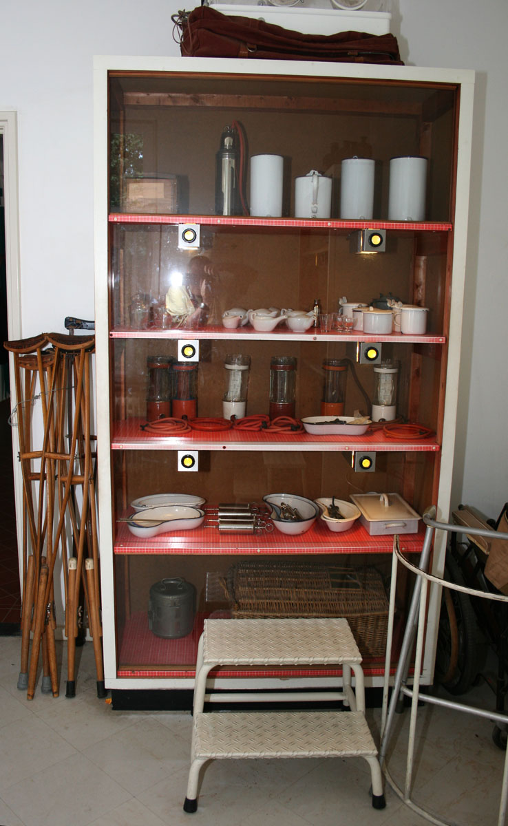 Groene Kruisgebouw, Wessem gemeente Heel, 1950-1960, 12.9 024voorraadkast in groene kruisgebouw(Wessum)